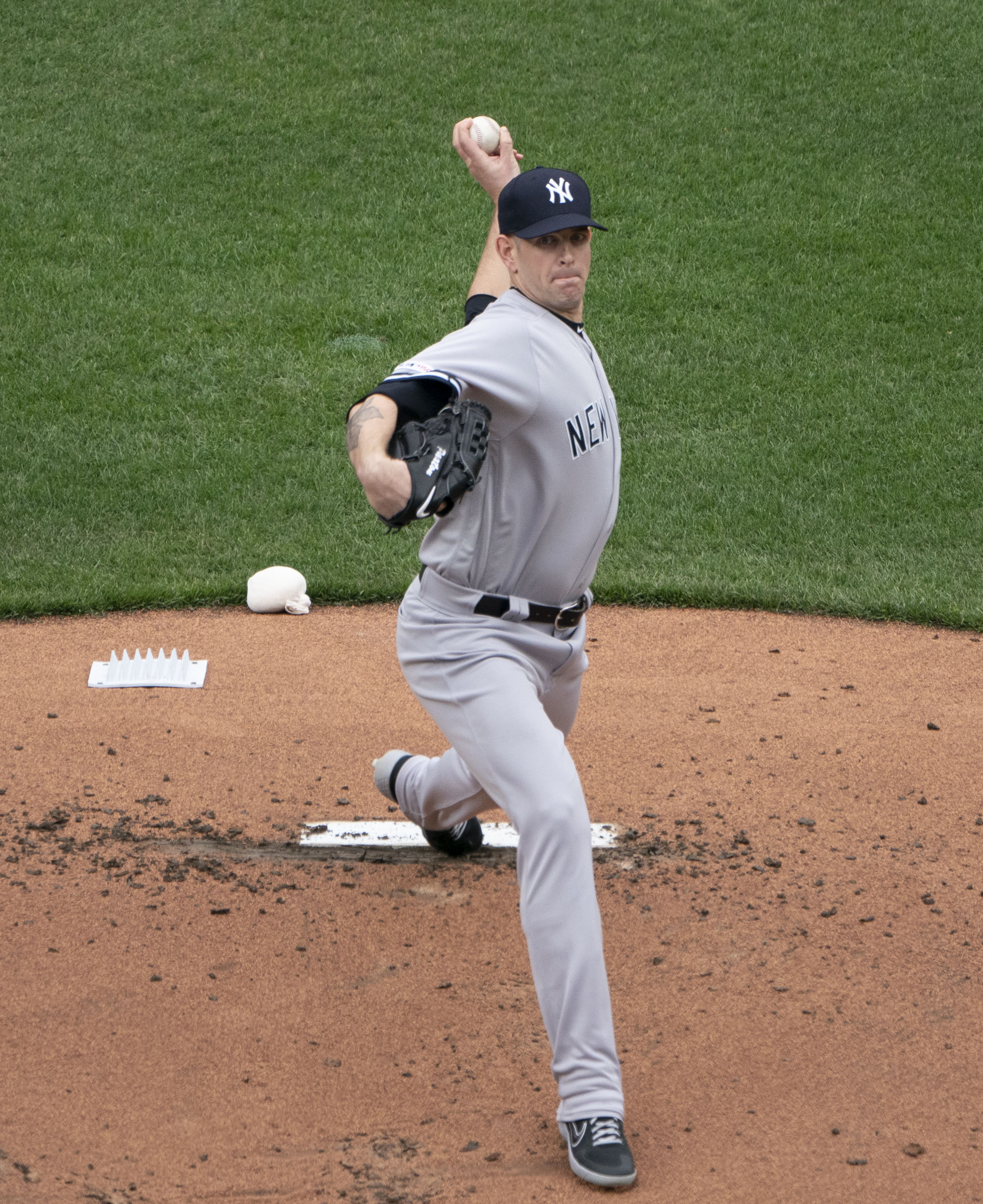 Yankees at Orioles 4/4/19